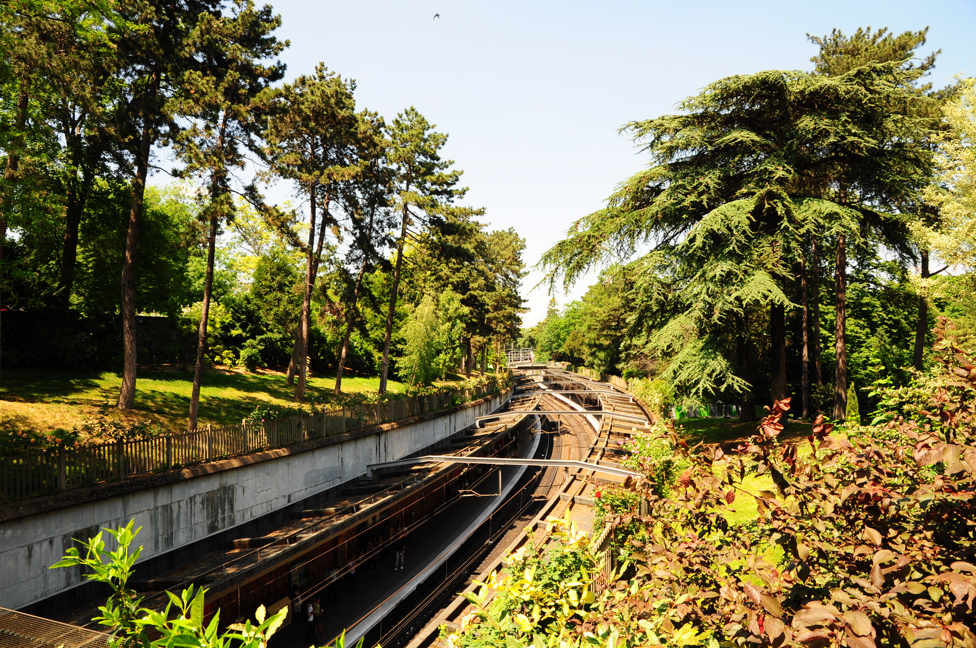 Gare de Cité universitaire.